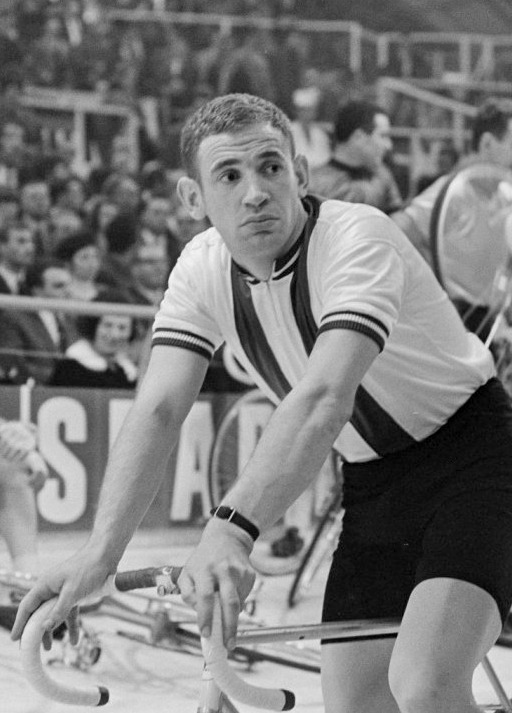 Zesdaagse in de RAI. Theo Verschueren